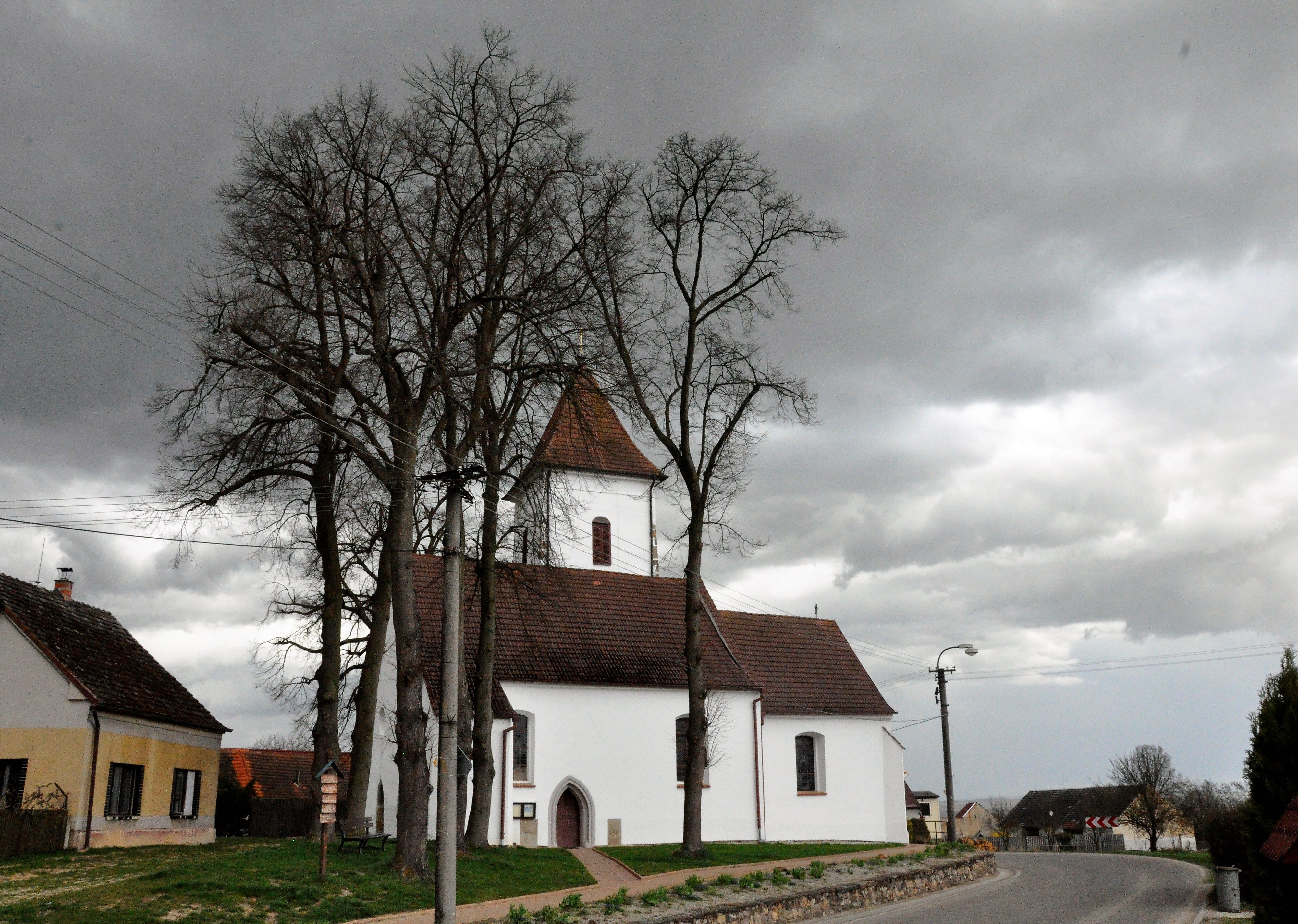 Kostel sv. Štěpána, Horní Bukovsko, fotka 13.4. 2018